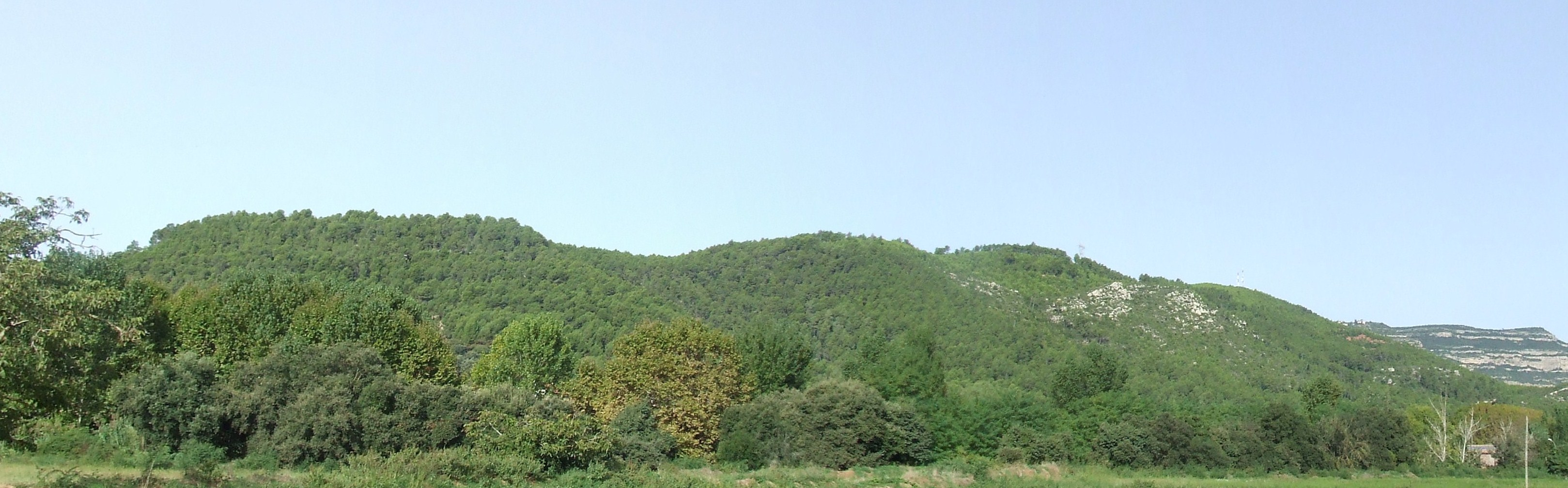 La Costa de Can Noguera (Bigues, Bigues i Riells, Valles Oriental)